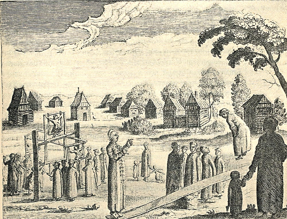 "Увеселения женщин"